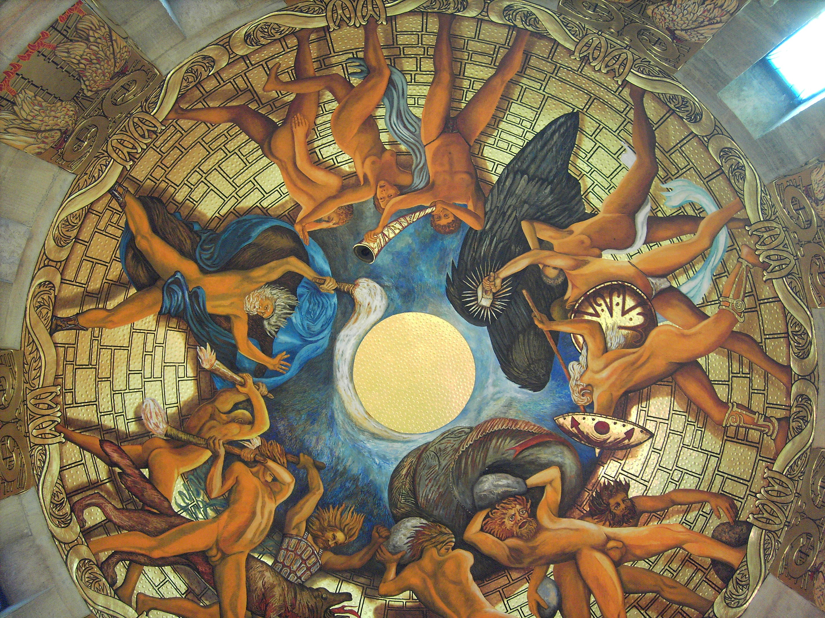 Burschenschaftsdenkmal, Eisenach - Ausschnitt aus dem Deckengemälde von Otto Gussmann